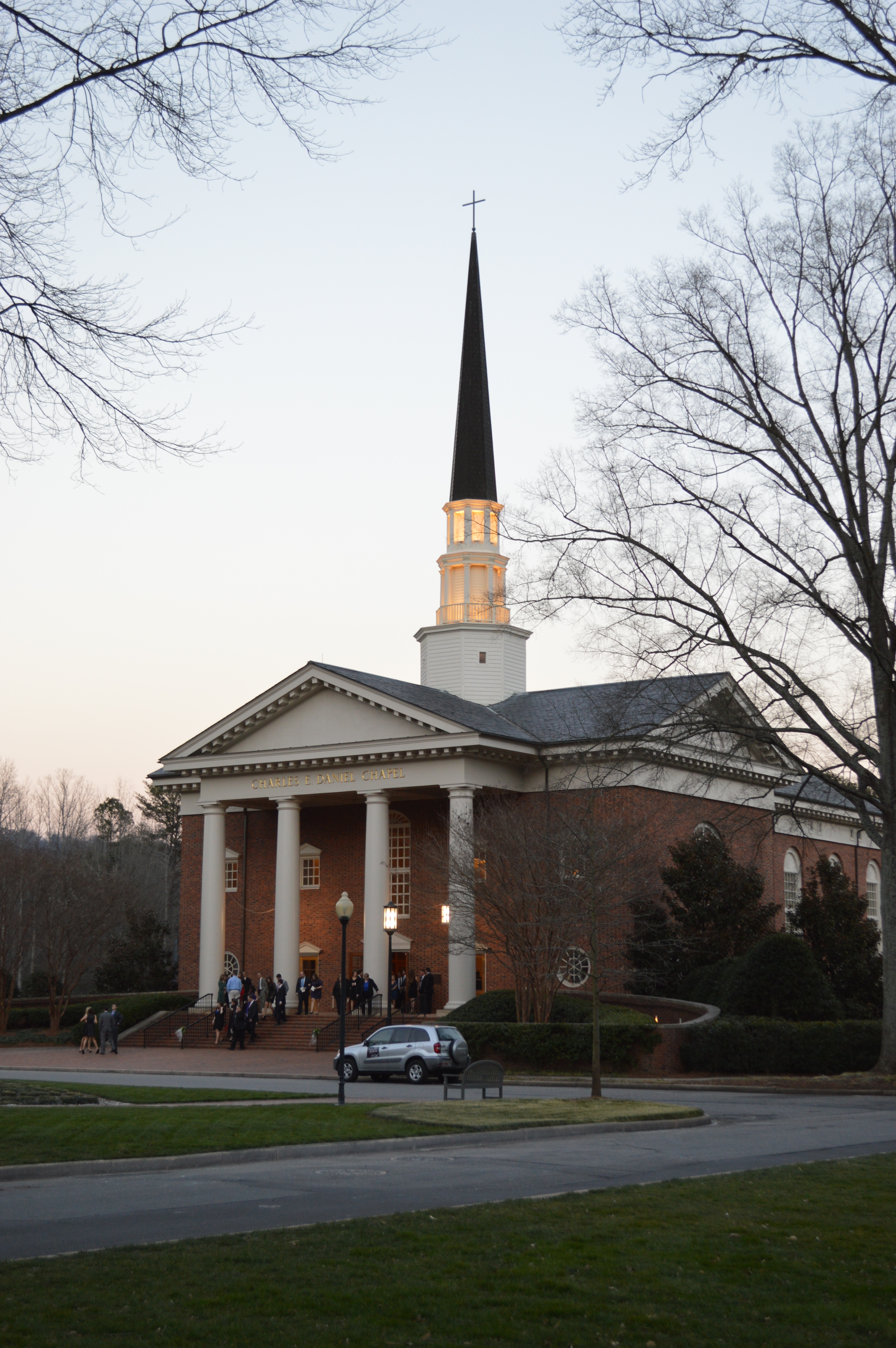 Daniel Chapel